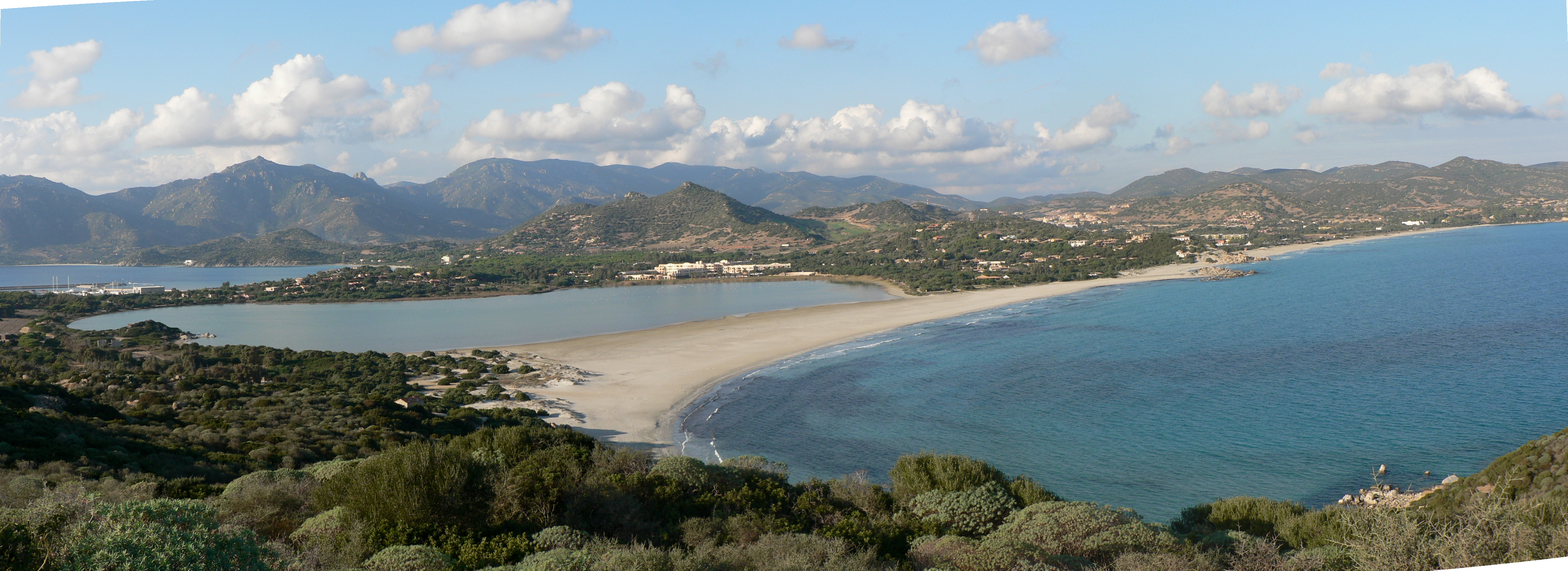 Capo Carbonara (Villasimius) - Spiaggia Porto Giunco e Stagno Notteri